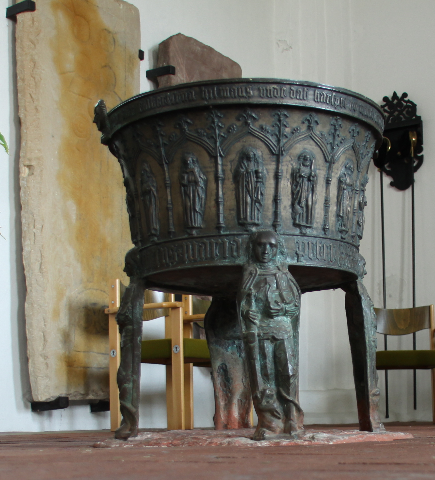 Bronzefünte (1496) in der Wibadi-Kirche zu Wiegboldsbur (Ostfriesland)